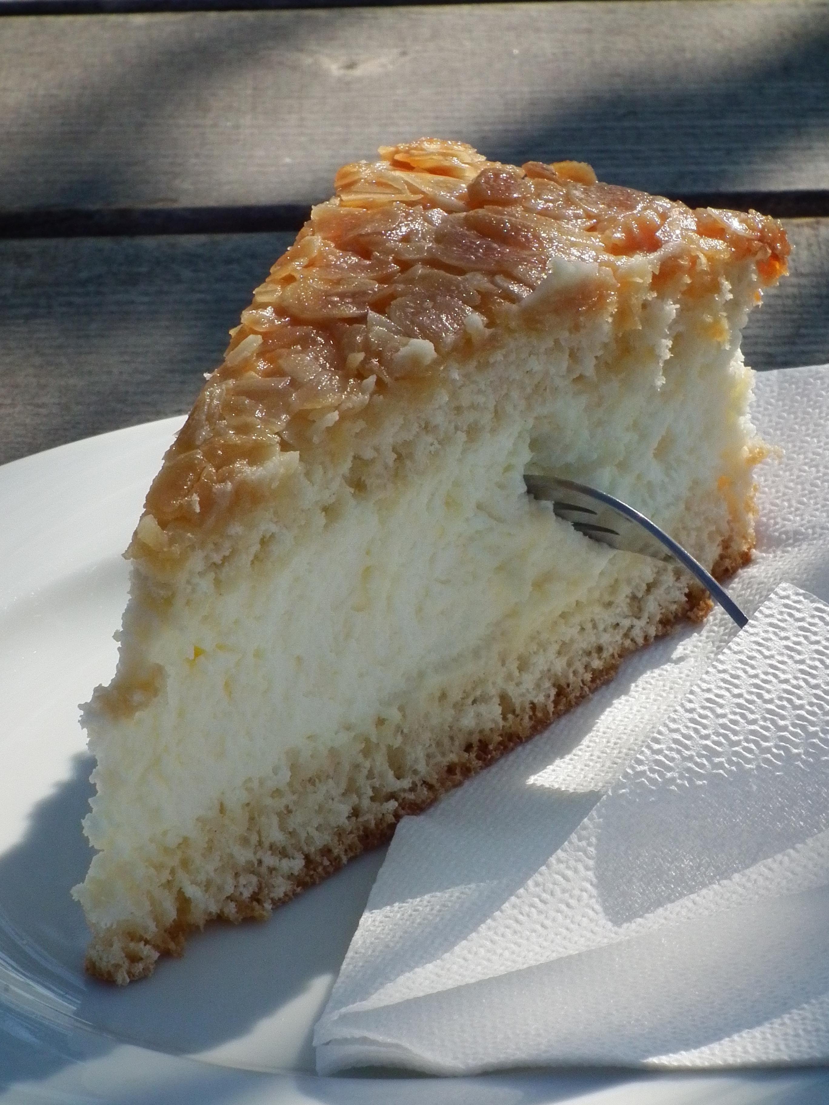 Stück Bienenstich